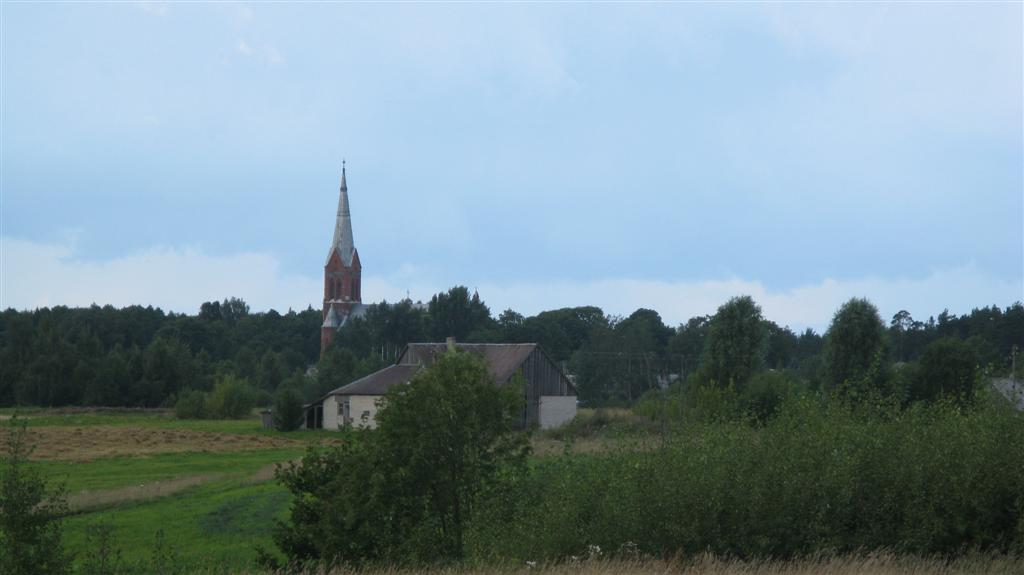 Žiobiškio panorama